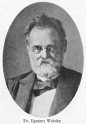 Fotografie von Egmont Websky